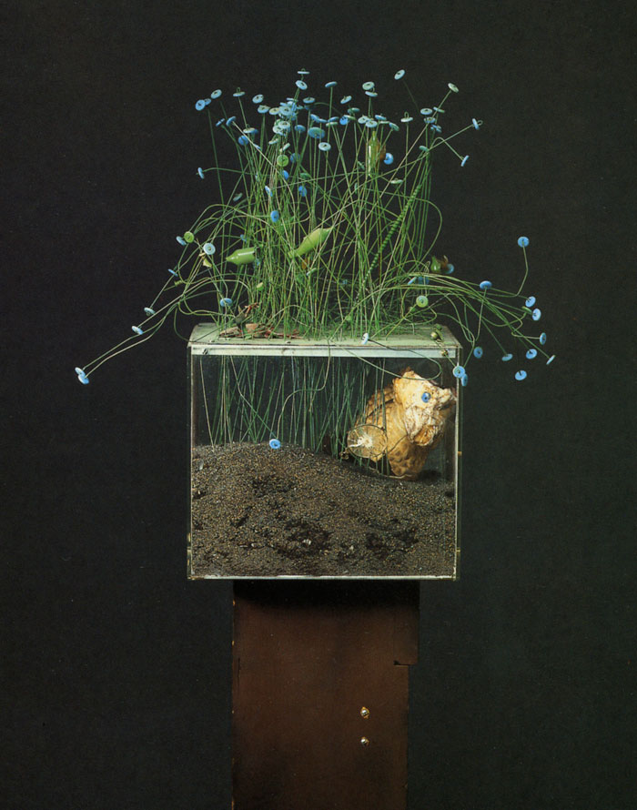 Sprechender Kasten von Irma Hünerfauh, Titel: Krieg - auch Tiere leiden, um 1986